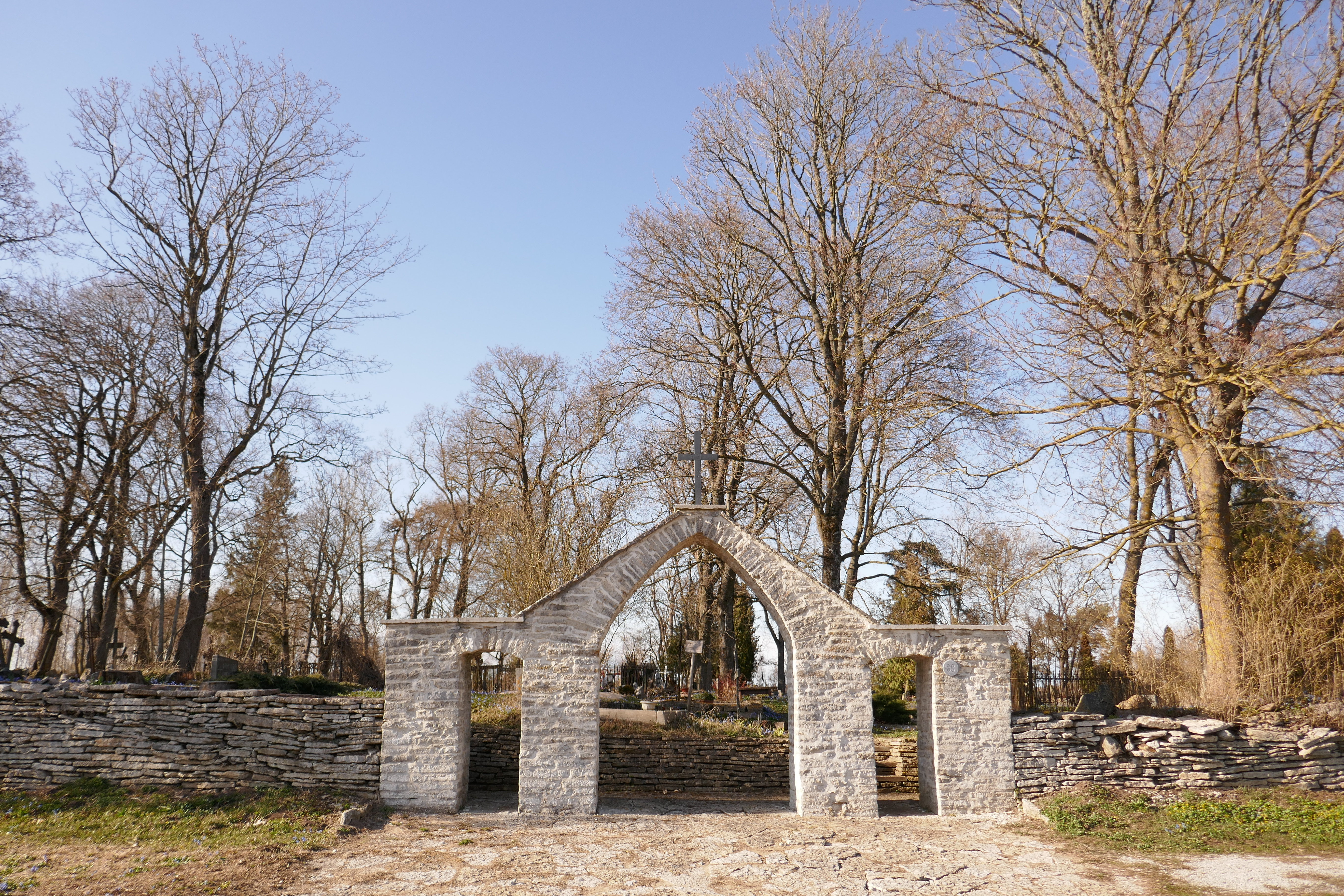 Jõelähtme kalmistu värav